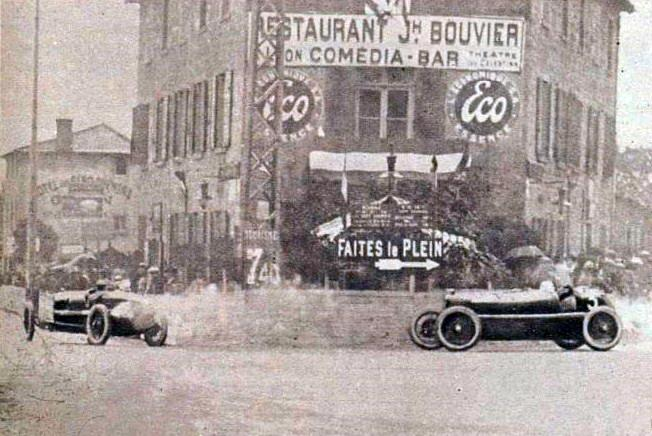 Louis Wagner vient de virer et repart, Enzo Ferrari aborde le tournant, au Grand Prix de France (d'Europe) 1924 à Lyon.